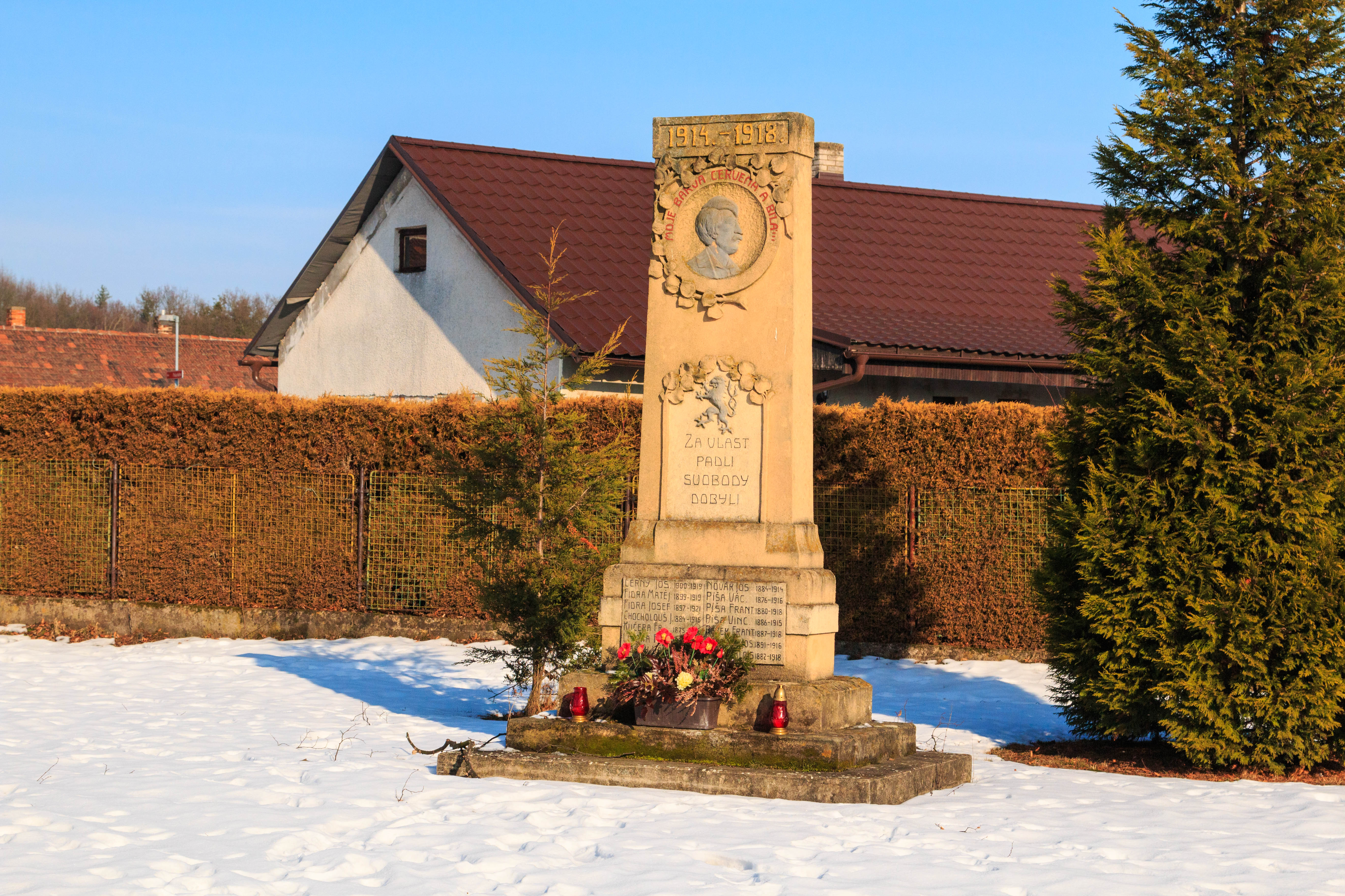 Pomník padlých v Rybitví, Rybitví.